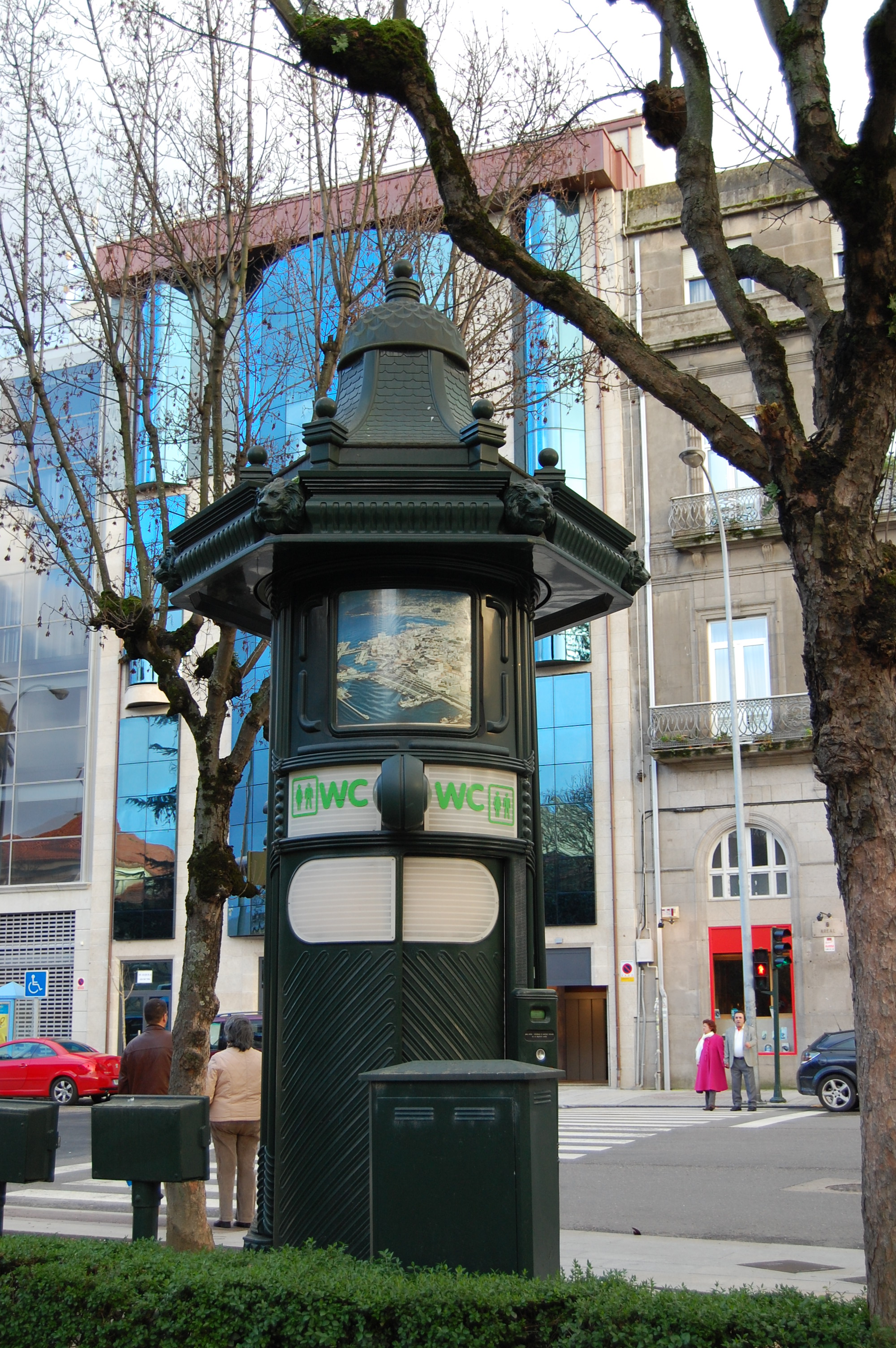 Um W.C. público em Vigo (praça de Compostela).